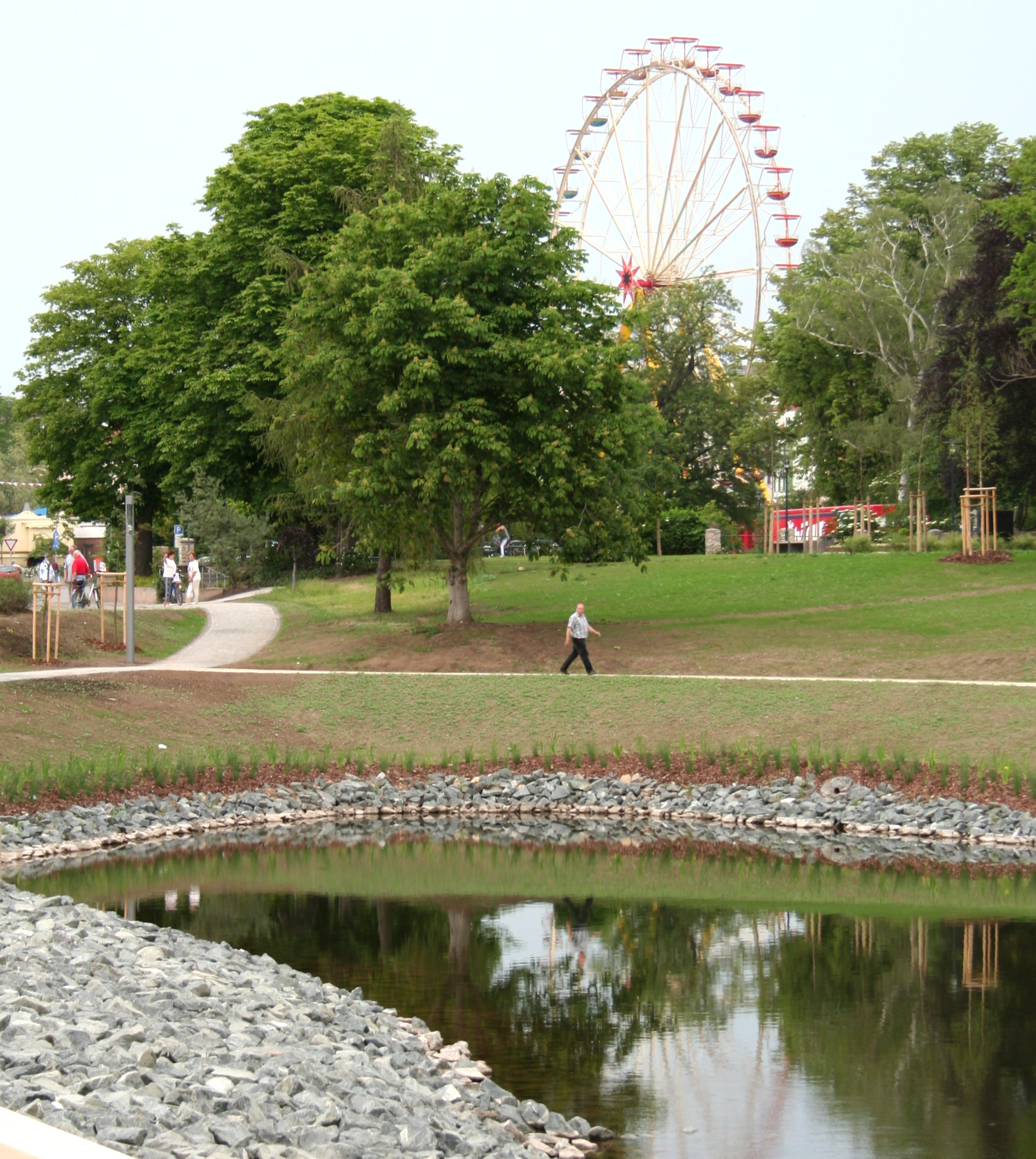 Lake in Staßfurt